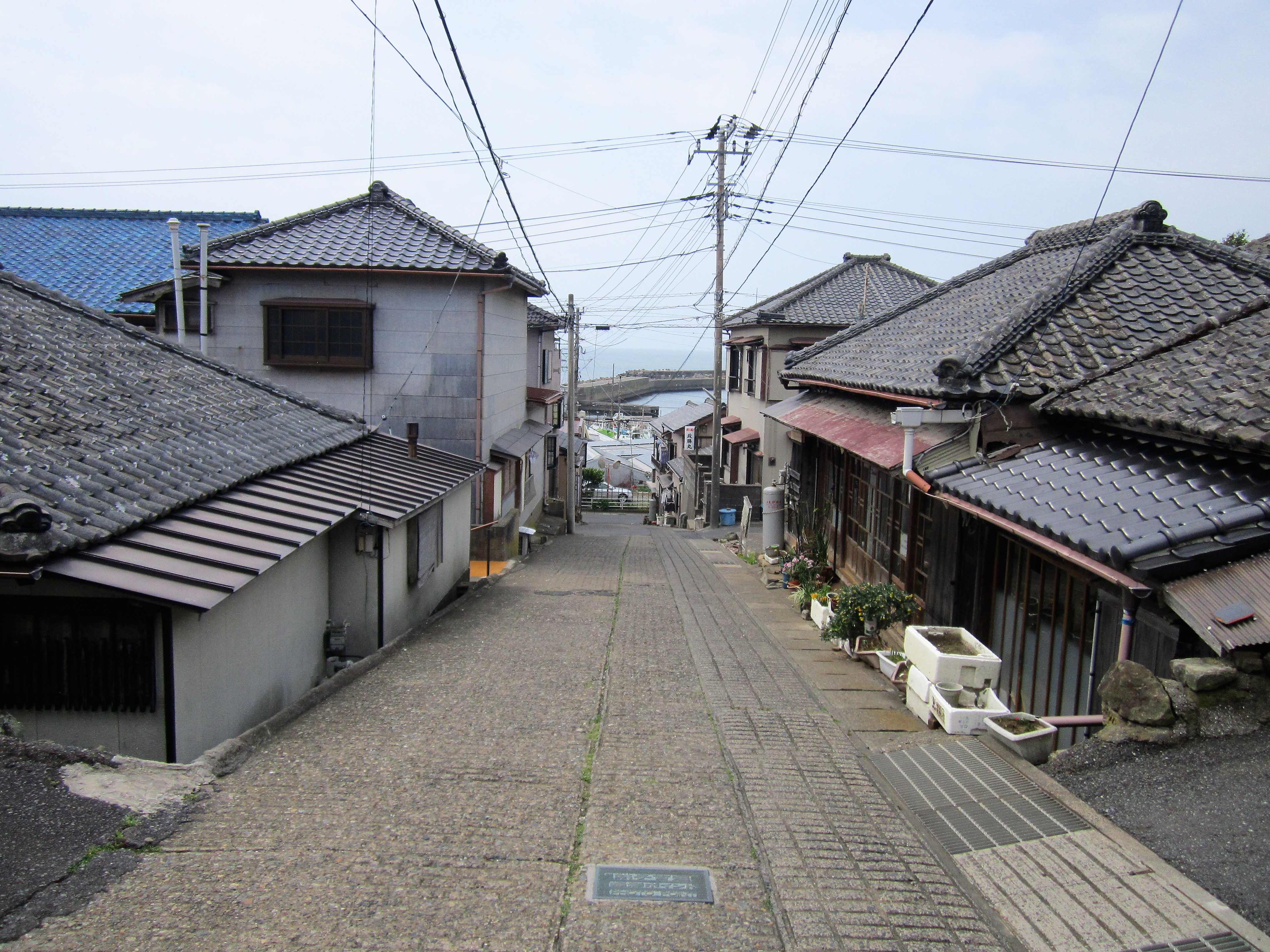 銚子市外川町 本浦通り Canon PowerShot A2200